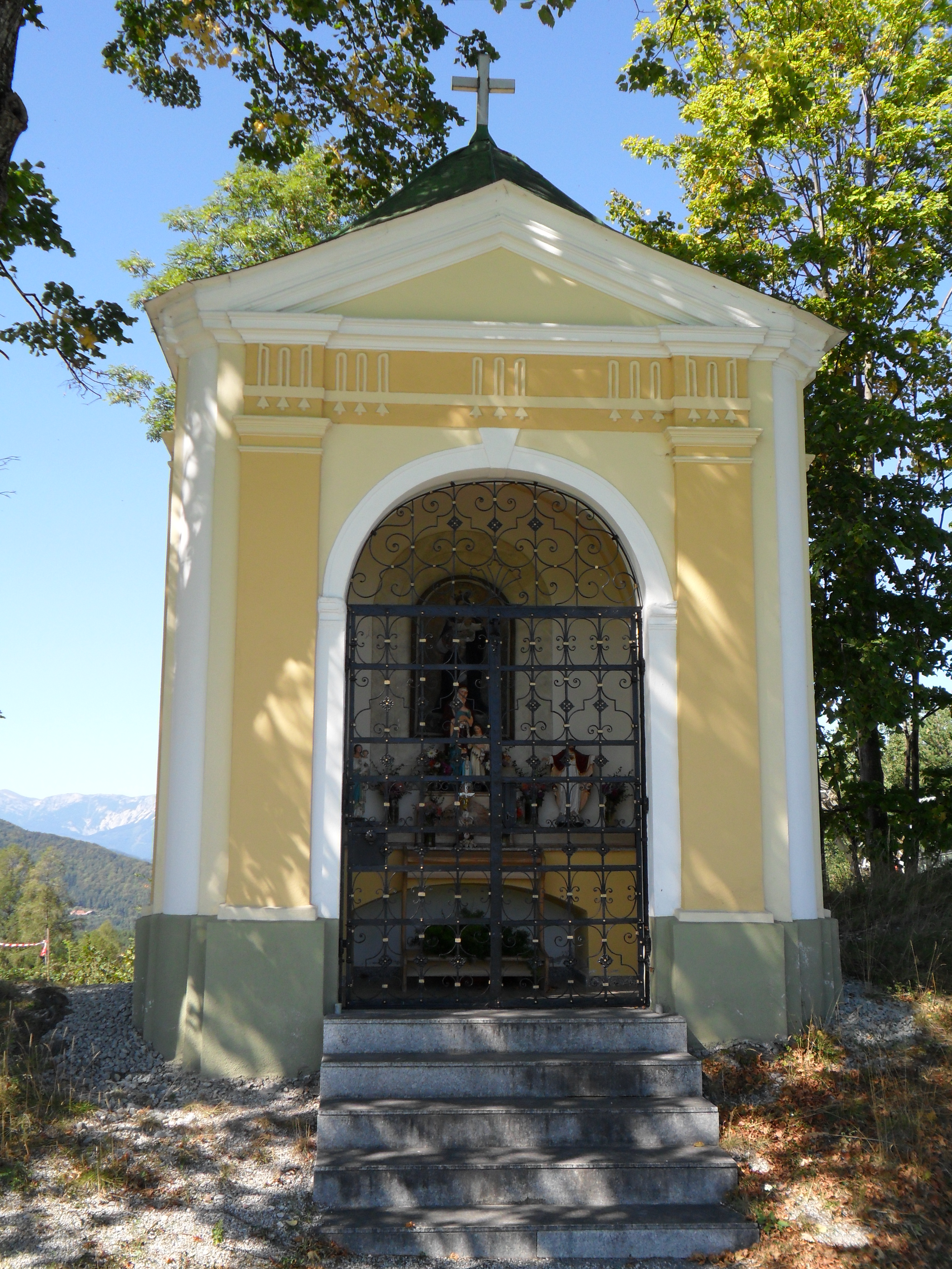 Wegkapelle in Schönstadl (Gemeinde Altendorf)